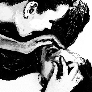 Umelé dýchanie z úst do úst